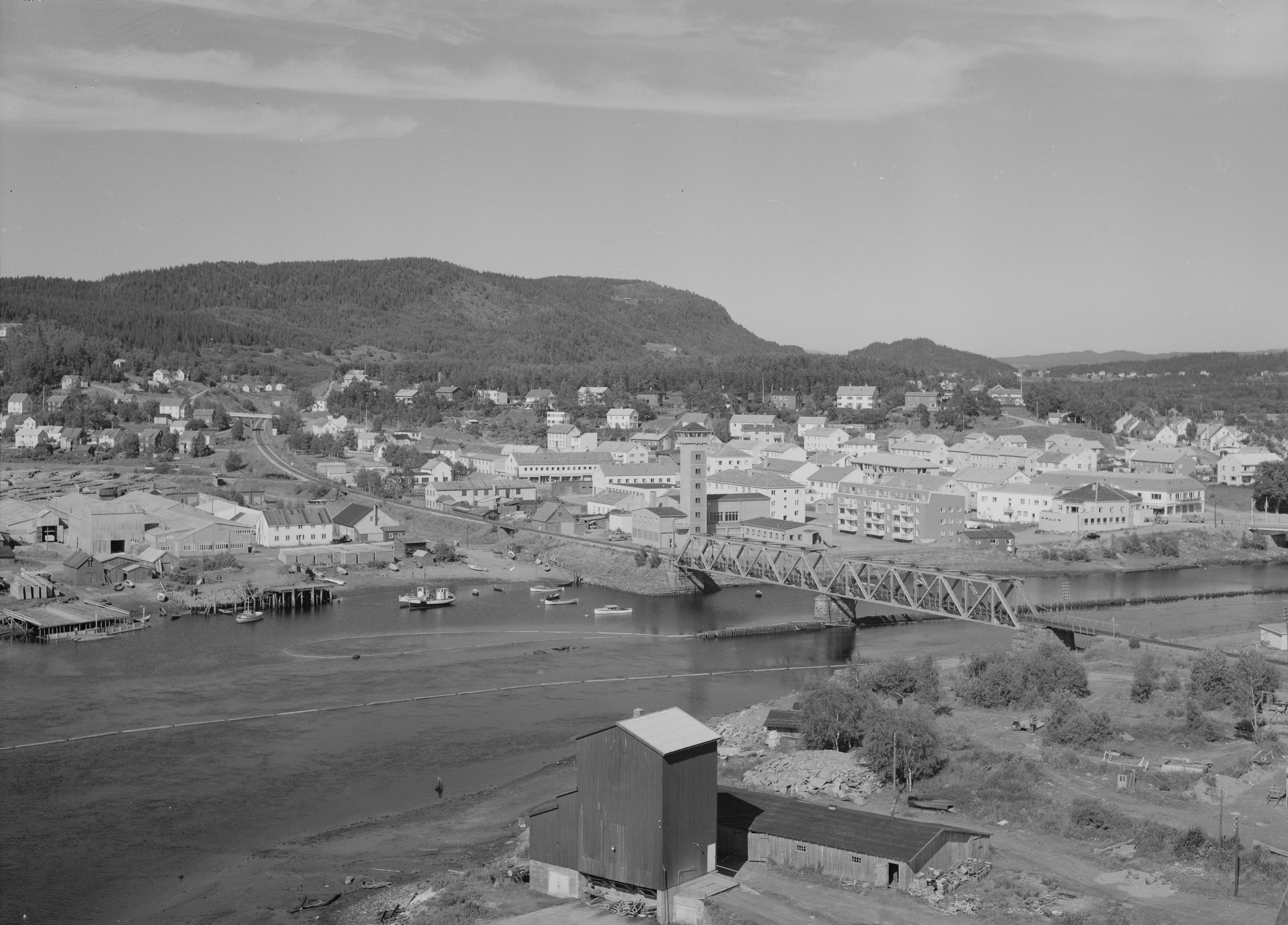 Bildet er hentet fra Nasjonalbibliotekets bildesamling. Anmerkninger til bildet var: Fotograf : L.S. Steinkjer, Steinkjer, Nord Trøndelag